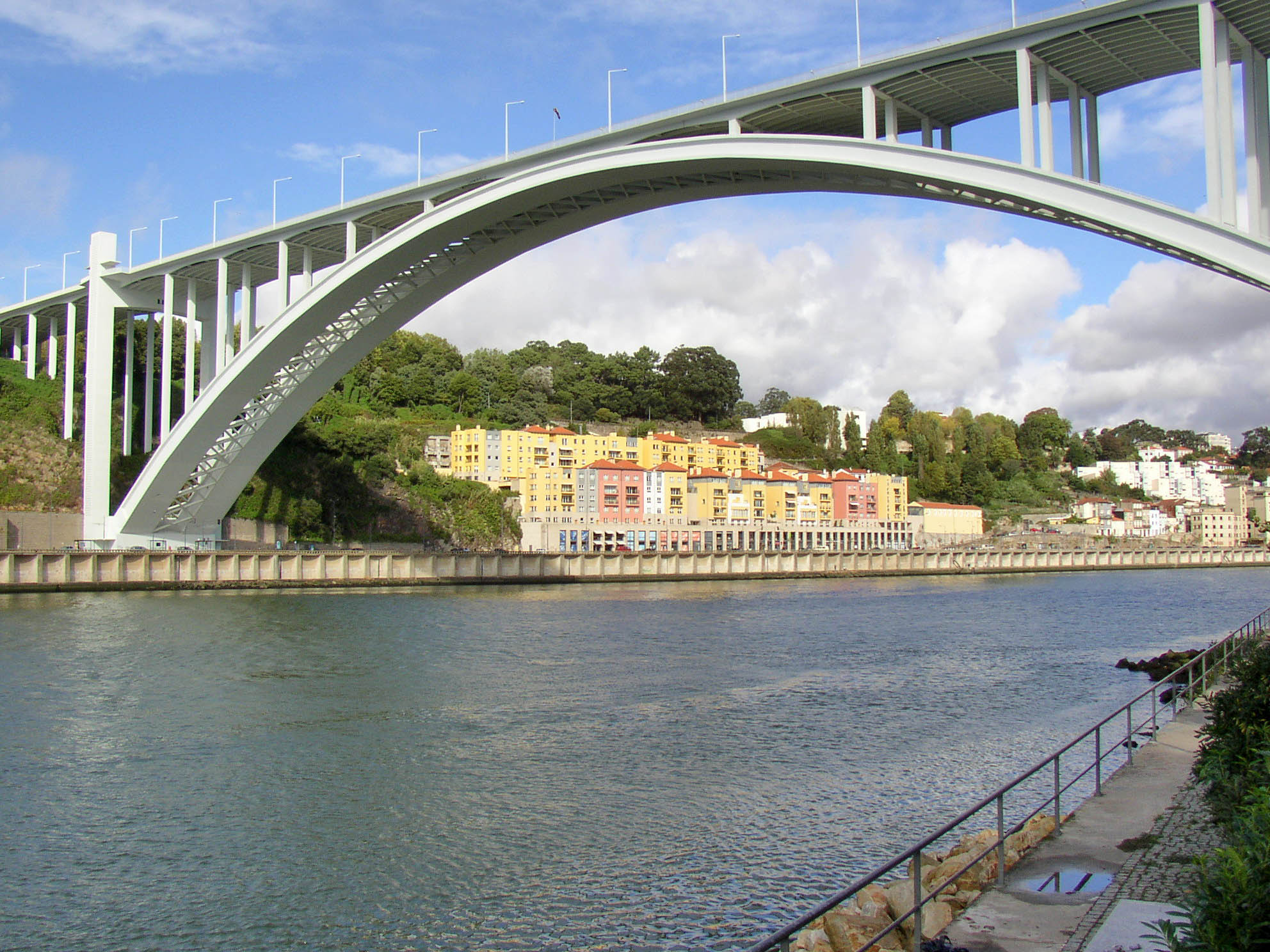 Ponte da Arrábida This file was uploaded for Wiki Loves Monuments in Portugal with the unique identifier 70797.